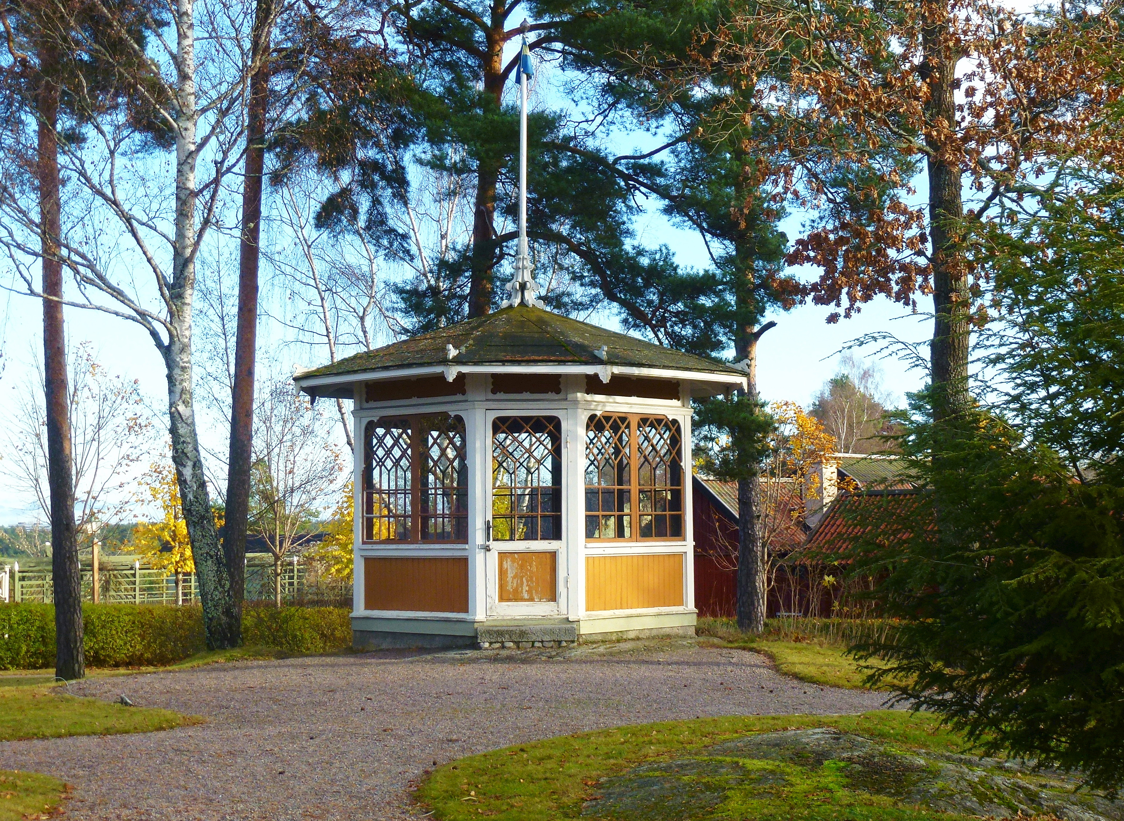 Lusthus i promenadparken, Torekällberget, ritad av Carl August Ehrensvärd och stod tidigare på Eriksberg säteri.